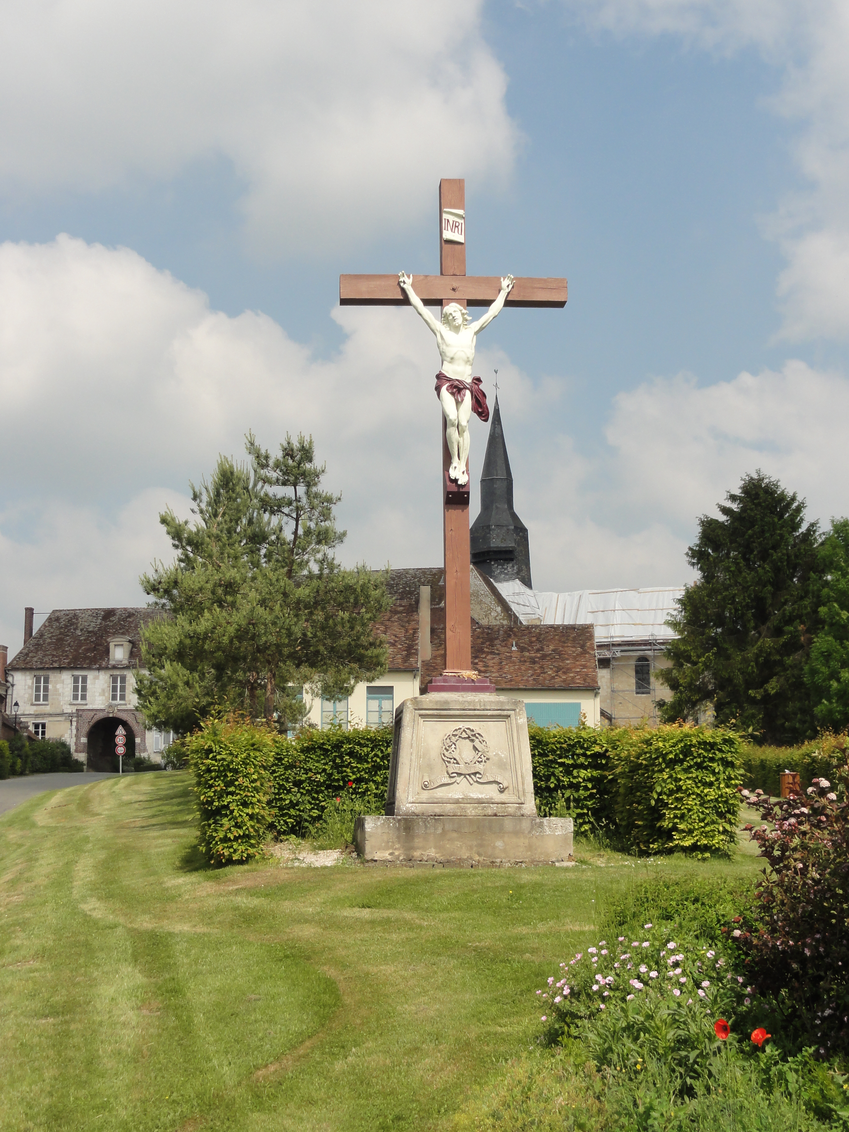 Calvaire à Montmille (près de la mairie).